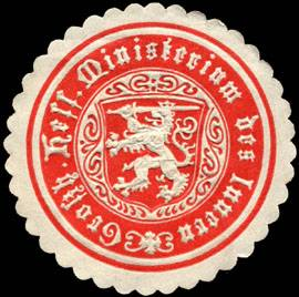 Sealing stamp Title: Grossherzoglich Hessische Ministerium des Innern Description: rot, weiß, geprägt Place: Darmstadt size: 4 cm